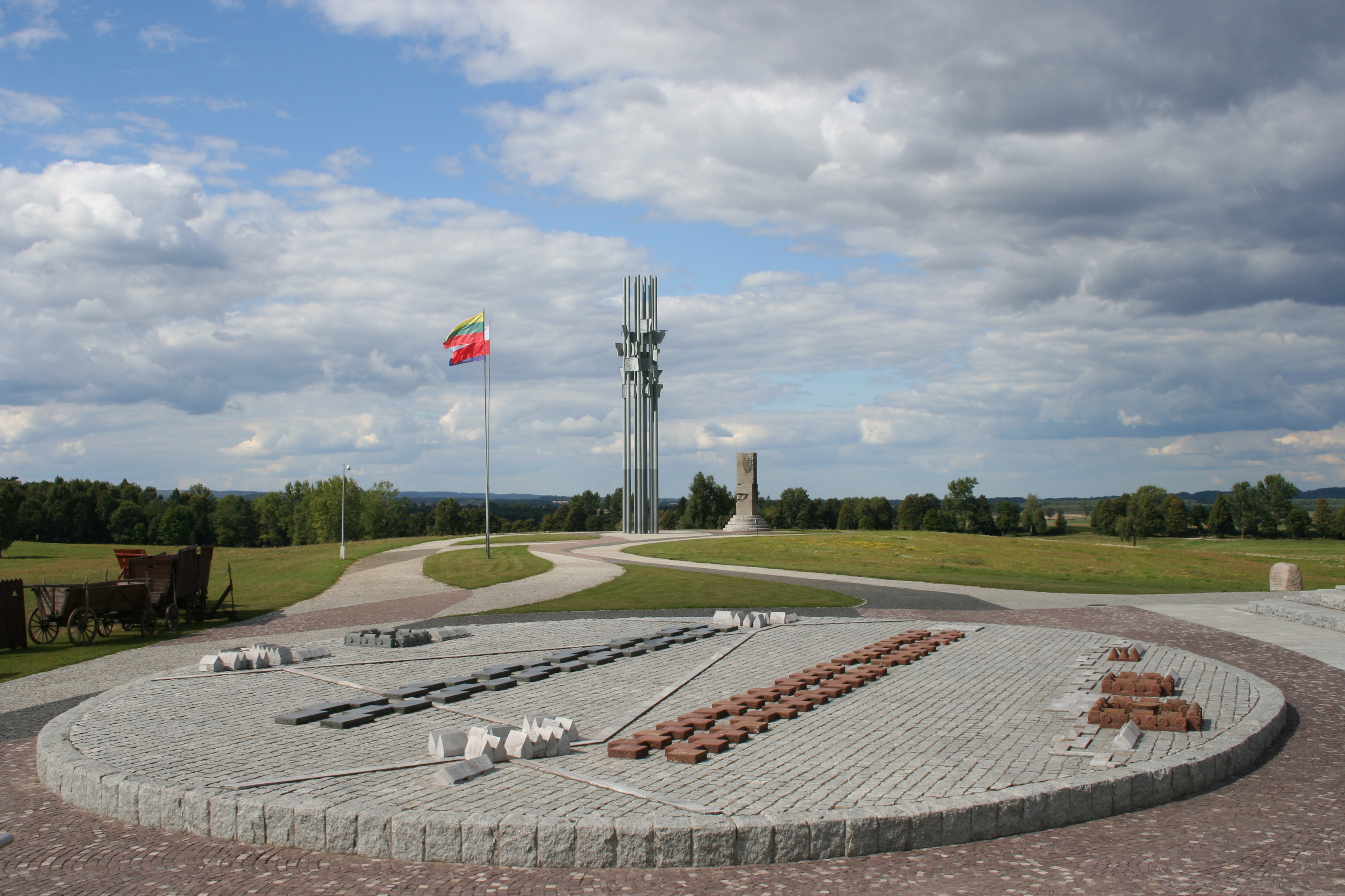 Grunwald, pomnik, 1960 (na polu bitwy z 1410)